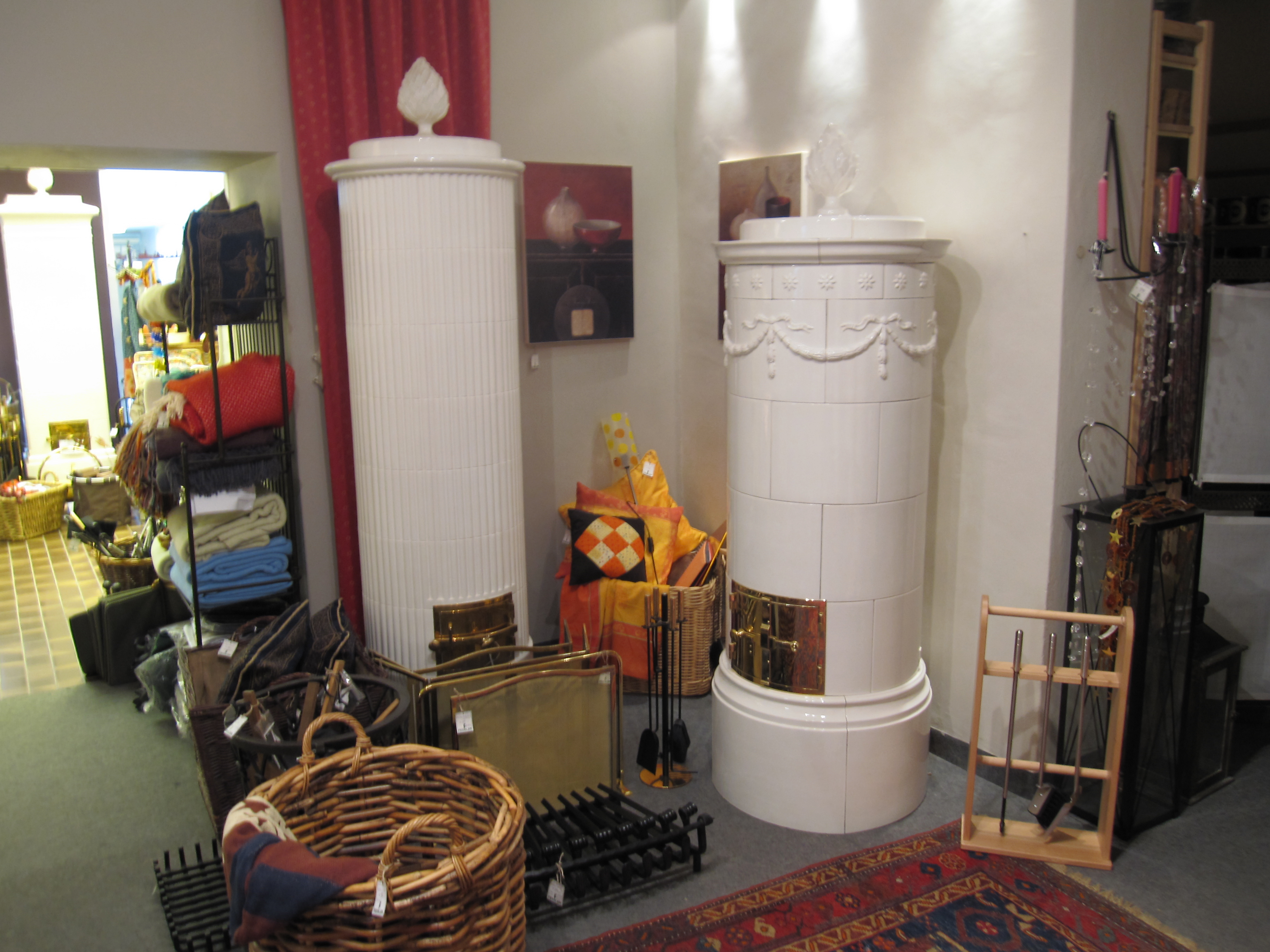 Rillenofen (links) von E. Fessler. Durchmesser: 63 cm, Höhe: 190 cm. Josephinischer Rundofen (rechts). Durchmesser: 60 cm, Gesamthöhe: 190 cm o. Vase.